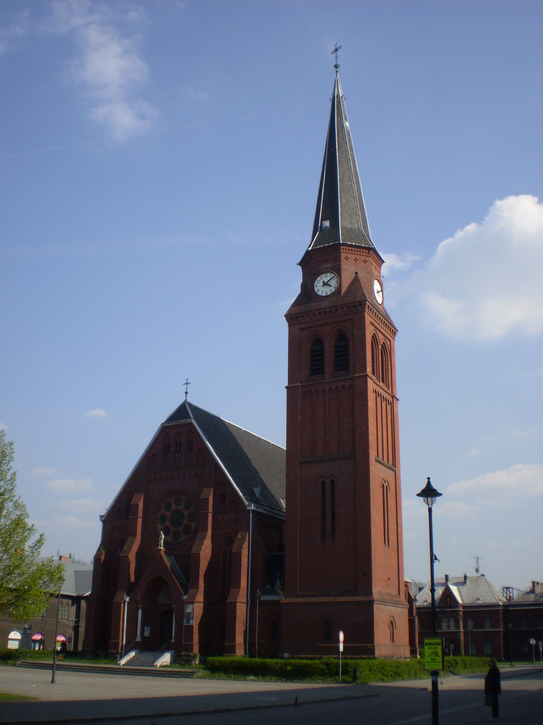 Novogotický kostel svatého Pavla v Ostravě-Vítkovicích.